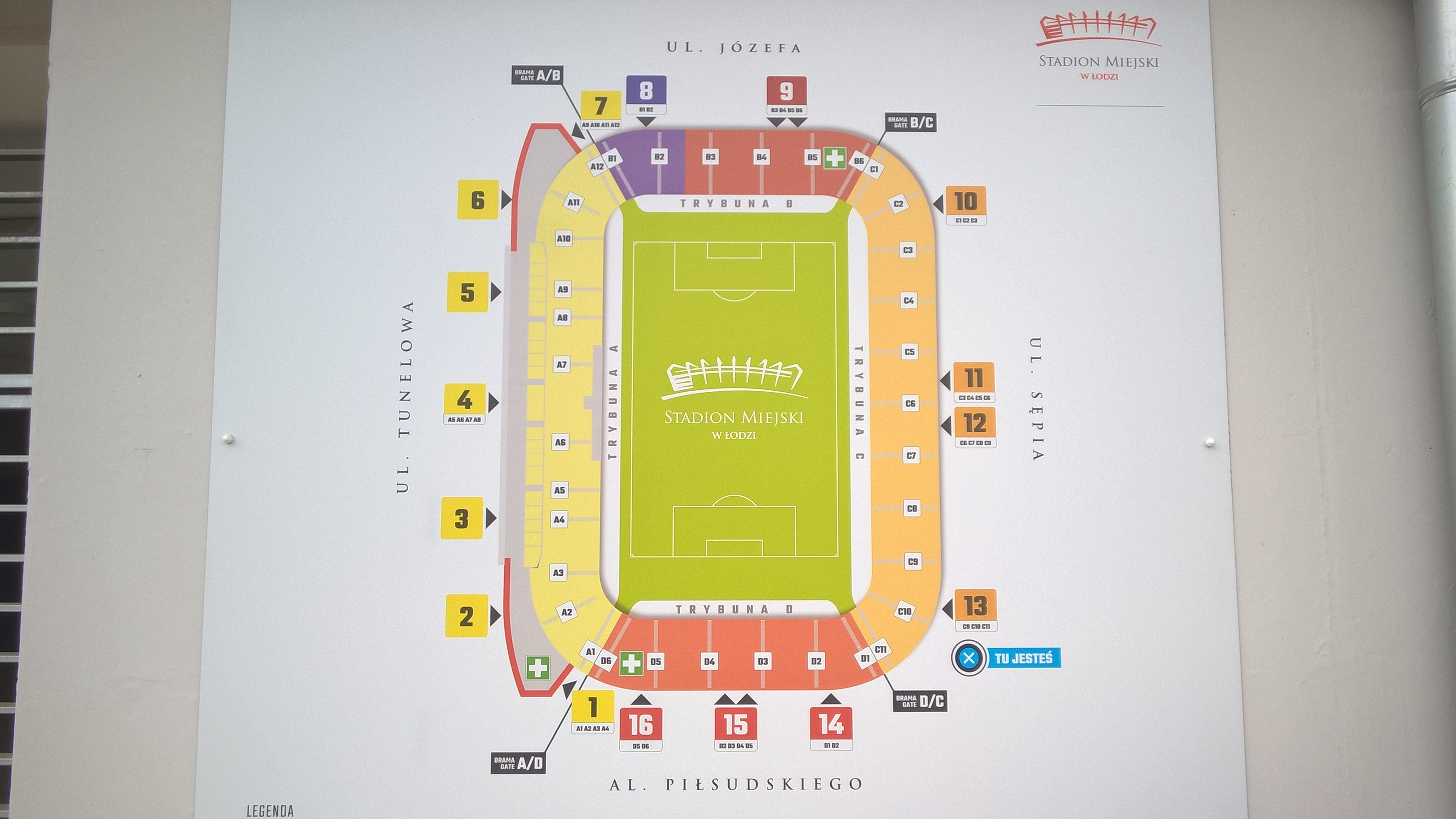 Plan nowego stadionu Widzewa